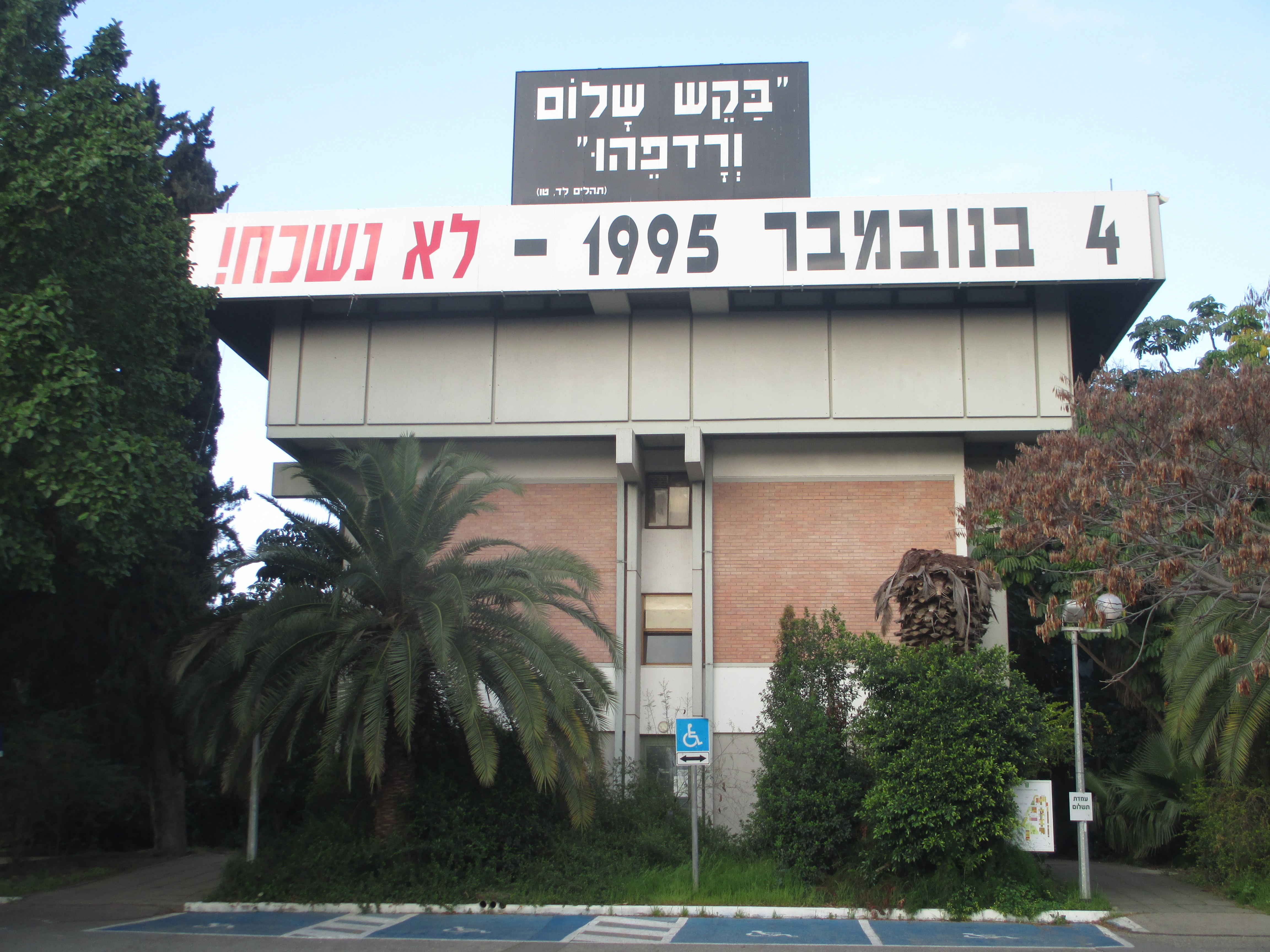 כתובת זיכרון לרצח יצחק רבין בסמינר הקיבוצים בתל אביב